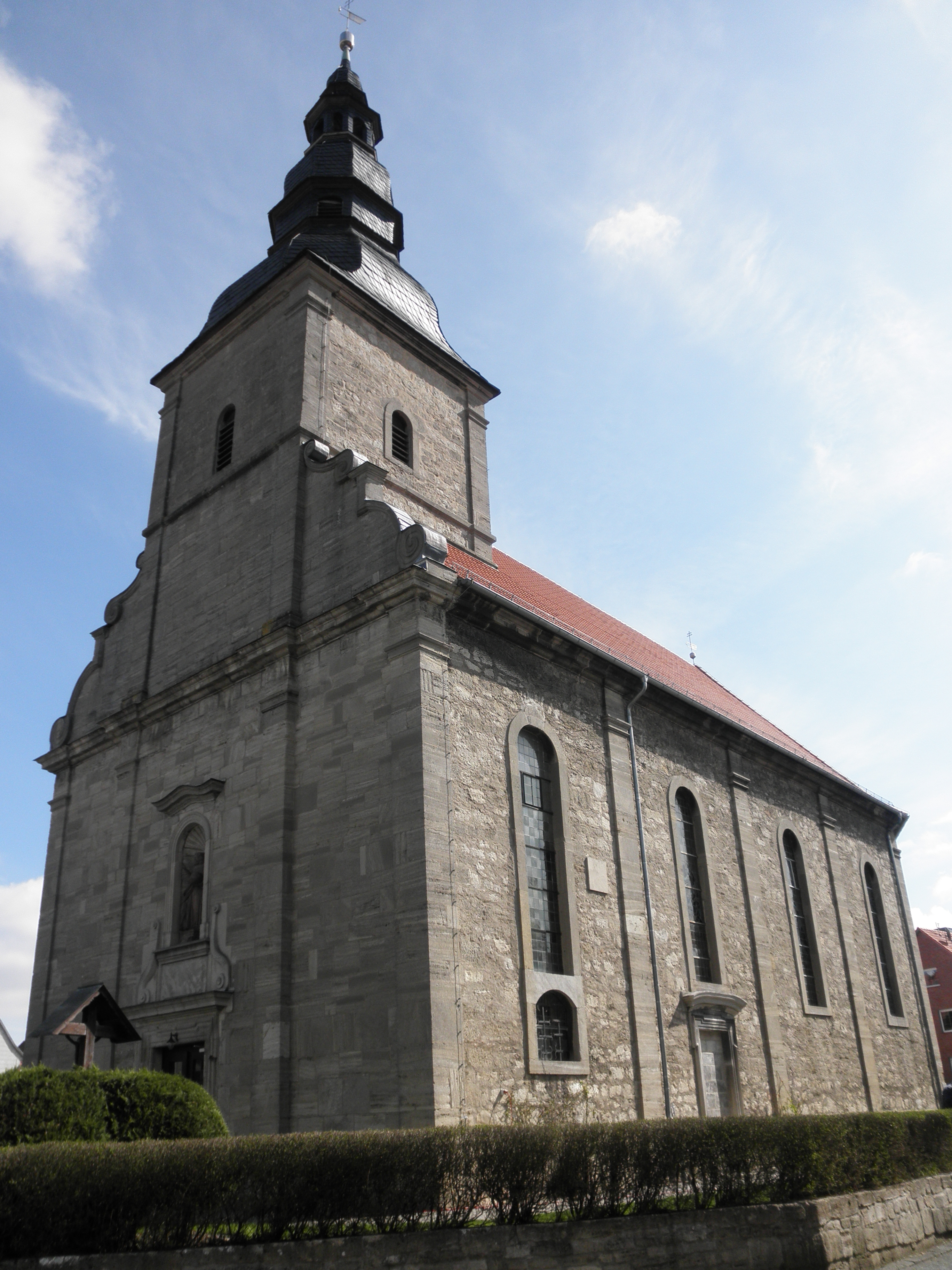 Katholische Kirche in Silberhausen (Eichsfeld)